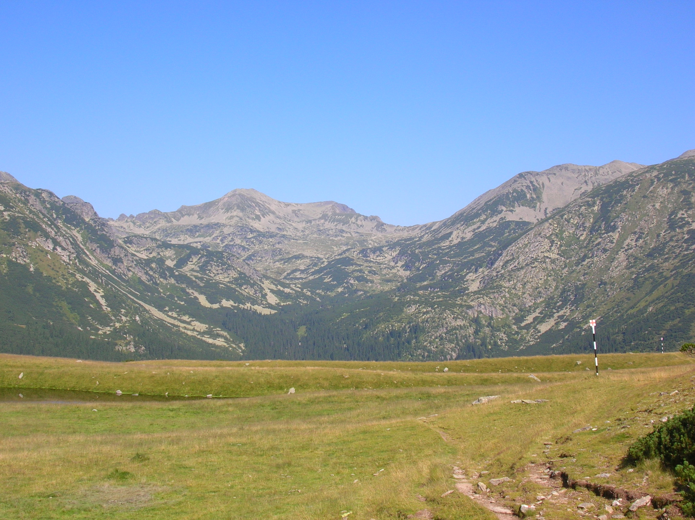 Retezat, Vf. Bucura (2433m) von Saua Plaiul mic (1879m) aus gesehen